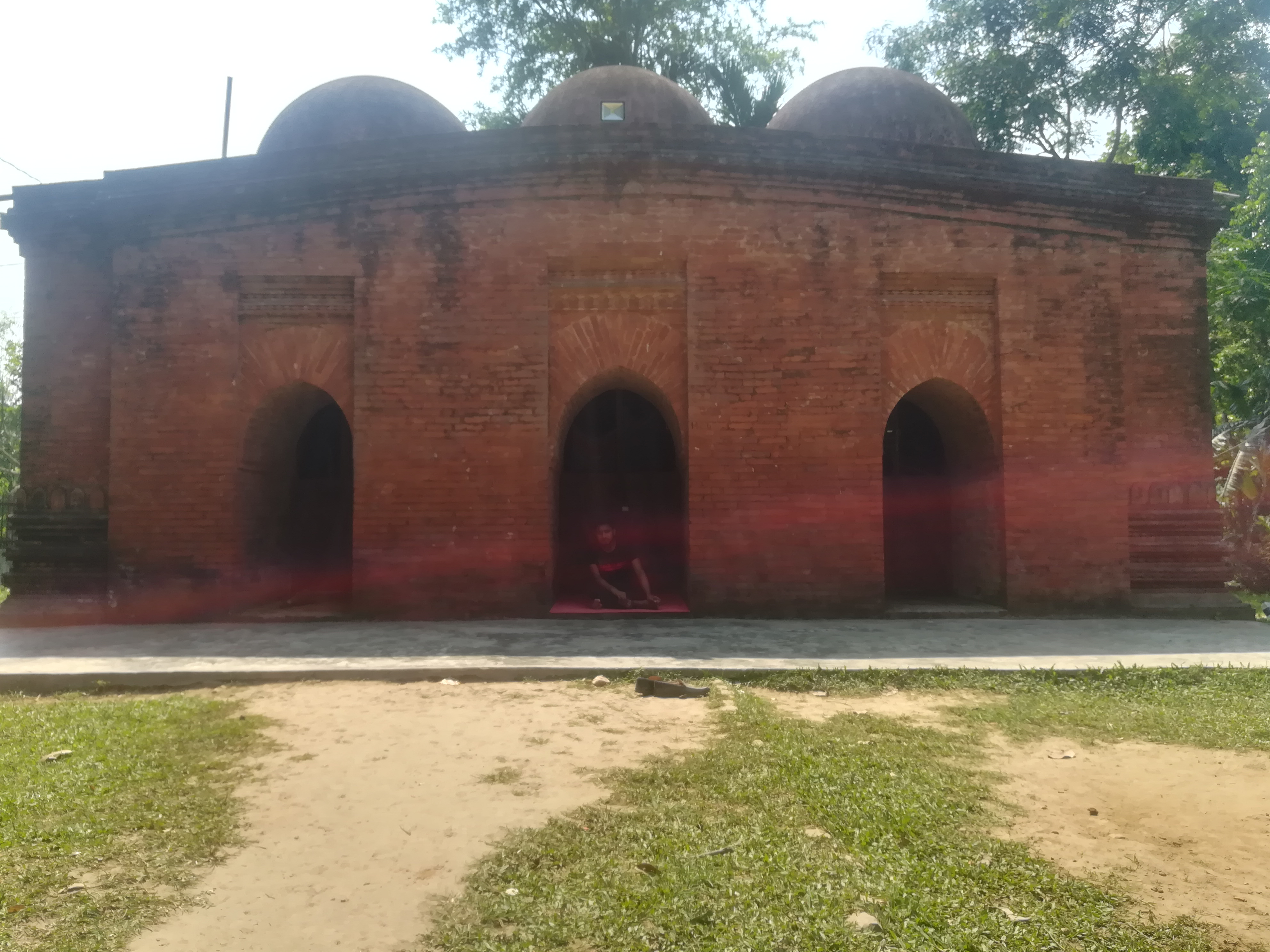 শর্শাদী শাহী মসজিদ